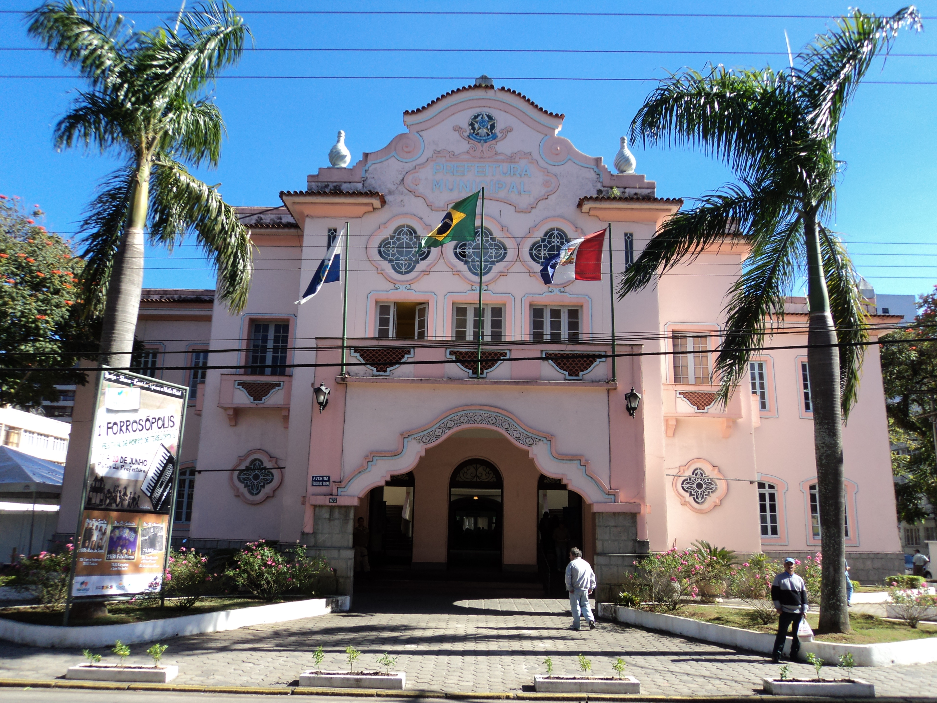 Prefeitura de Teresopolis - palacio Thereza Crisstina